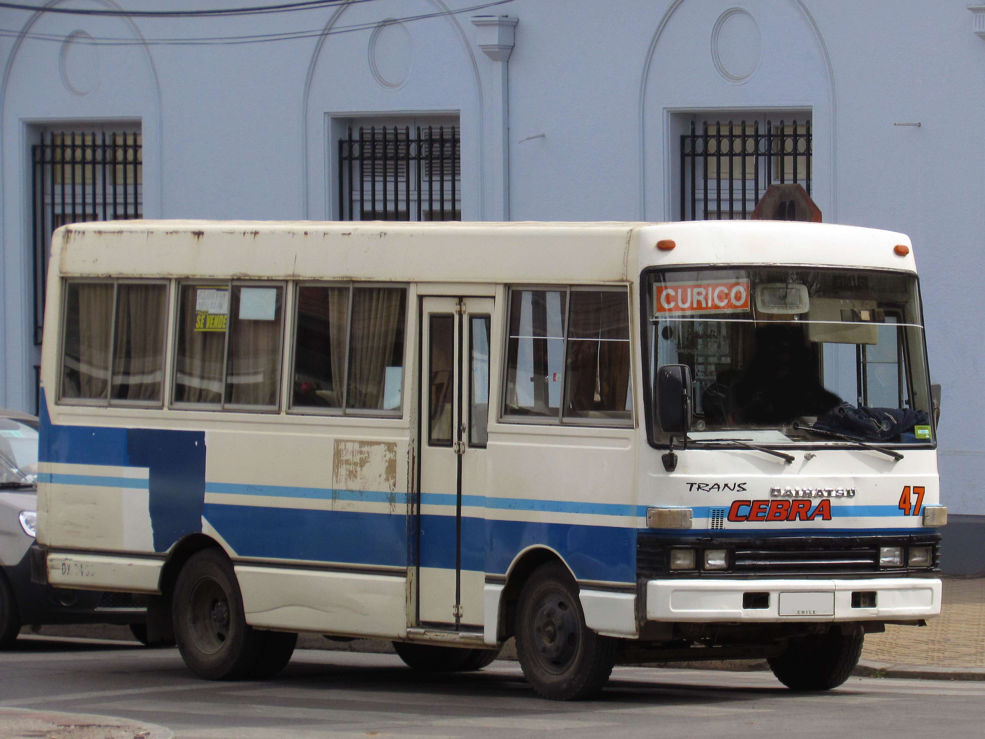 Daihatsu Delta Bus 1992